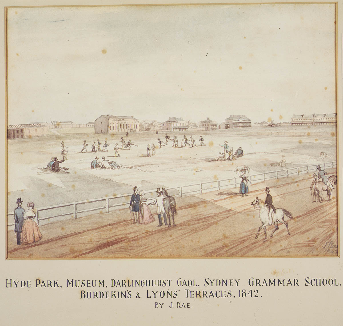 Pengarang: Rae, John, 1813-1900 Tarikh ciptaan:1842 Judul imej:Taman Hyde, Museum, Darlinghurst Gaol, Sydney Grammar School, Burdekin's and Lyons' Terraces, 1842 / painted by John Rae Provenance: State Library of NSW Call Number DG SV*/Sp Coll/Rae/19 No. urutan digital a128275 Sumber: Penjelasan: Lukisan Taman Hyde Sydney pada 1842. Sydney Grammar School, the Australian Museum, Burdekin's and Lyons' Terraces, dan Penjara Darlinghurst dapat dilihat di beberapa jarak sahaja.